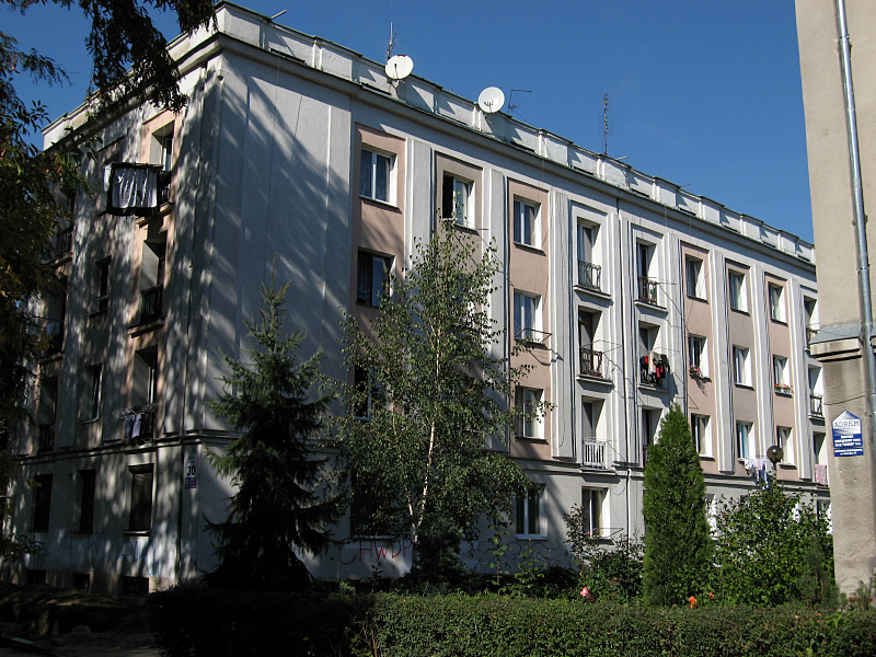 Nowa Huta osiedle Teatralne - blok